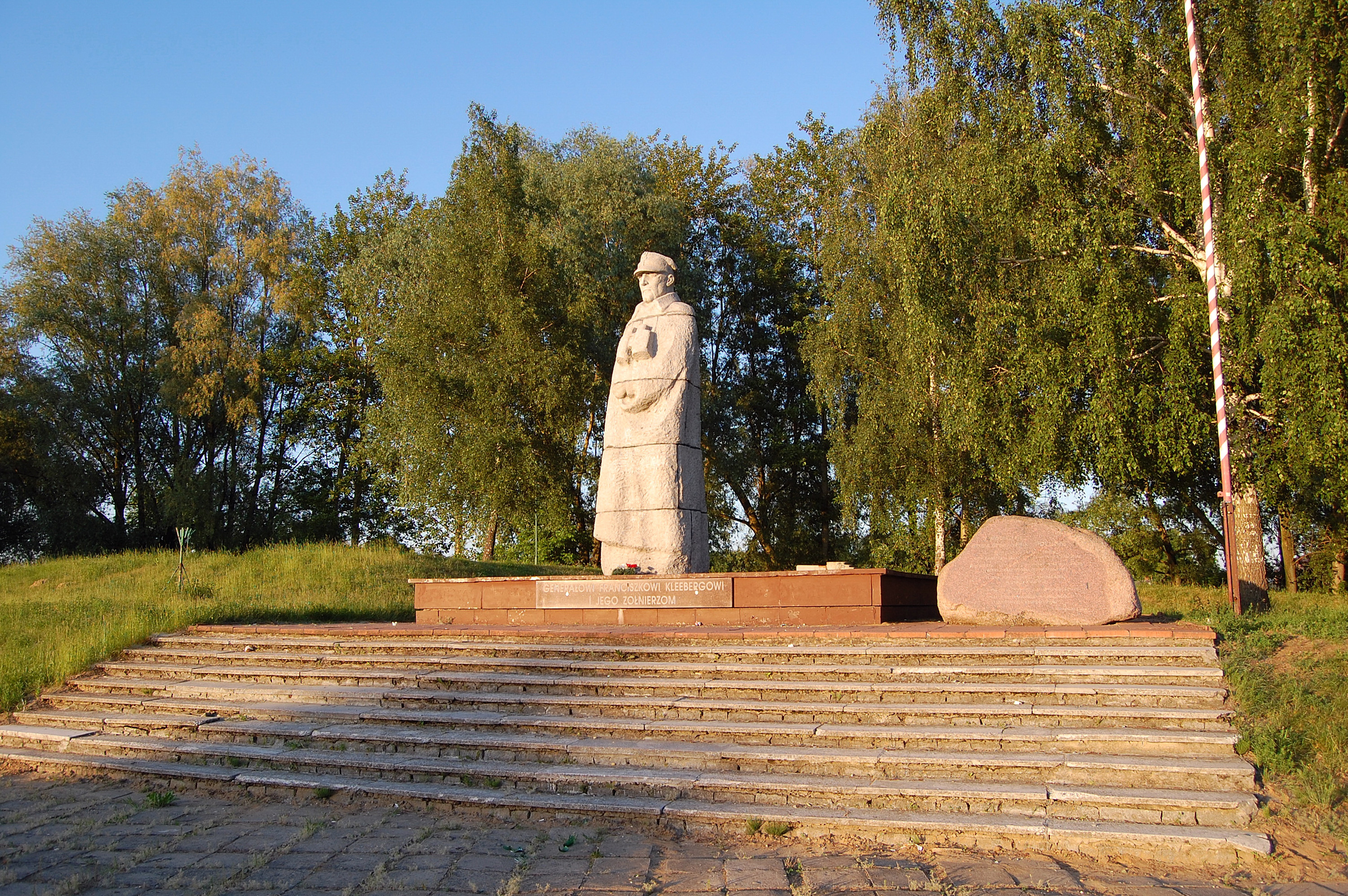 Kock Pomnik gen. Franciszka Kleeberga